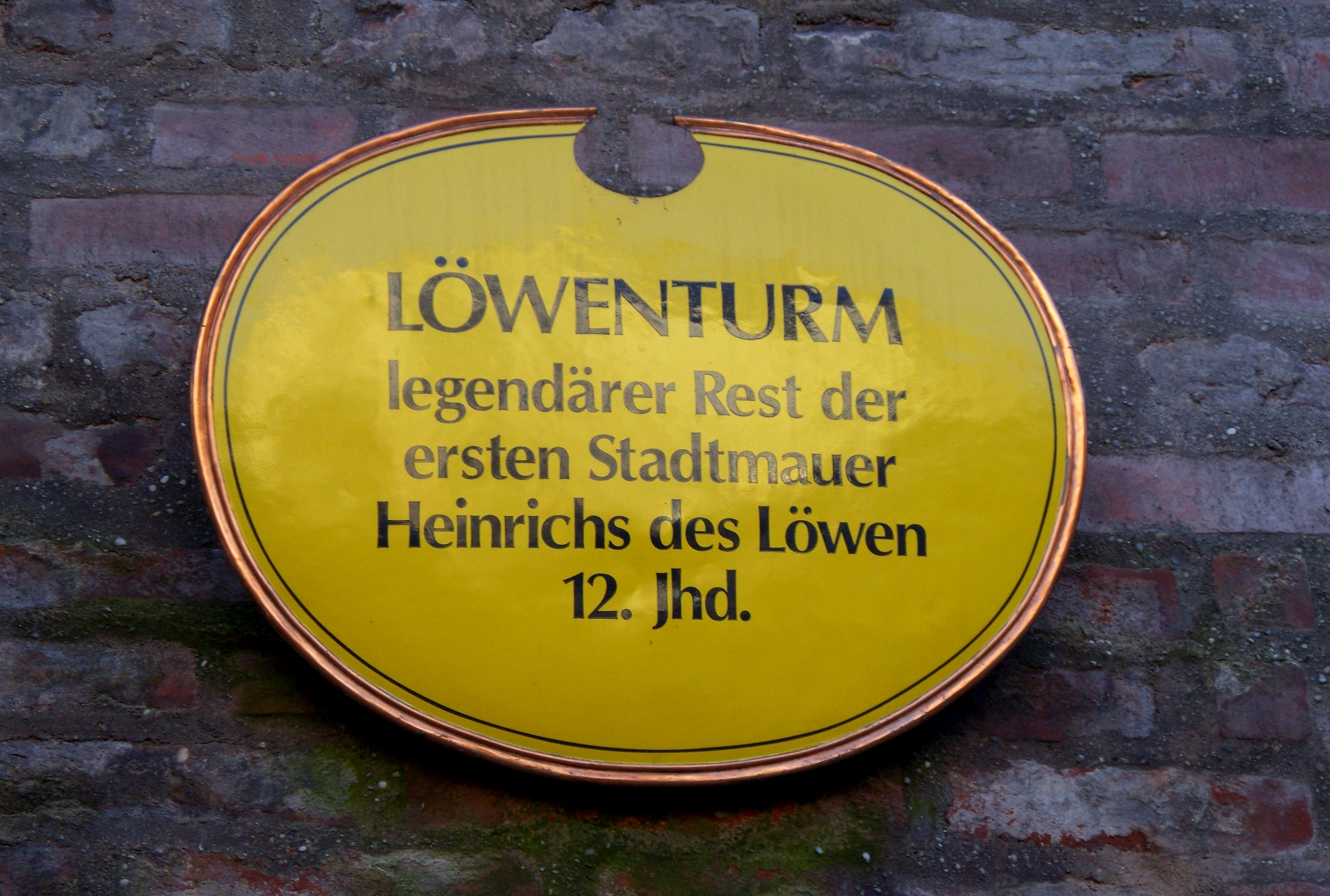 Infotafel, die an der Nordseite des Löwenturms in München angebracht ist.